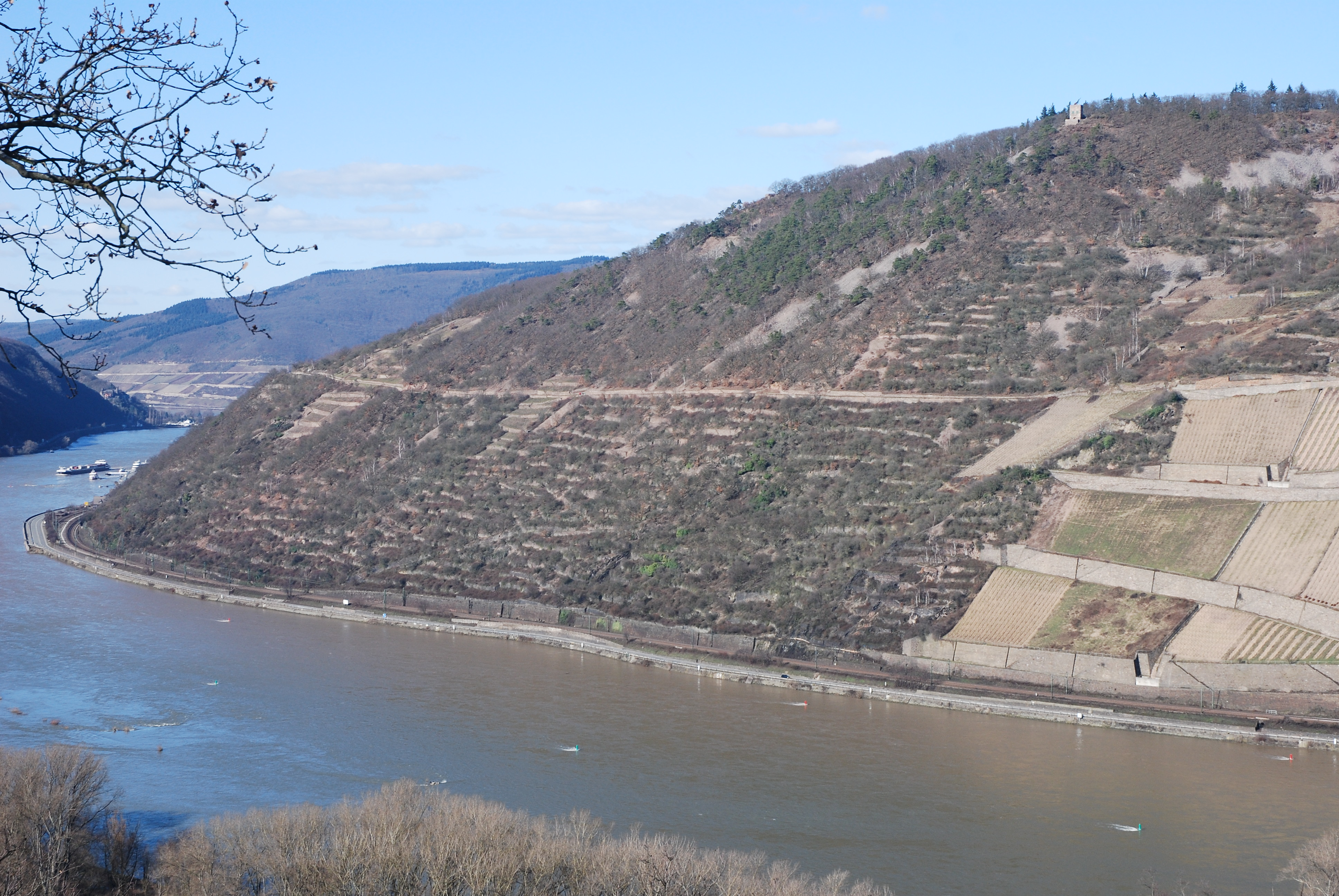 Aufgelassene Kleinterrassen für Weinbau in der Gemarkung Assmannshausen bei Burg Ehrenfels; oben rechts der Aussichtspunkt Rossel im Landschaftspark Niederwald, darunter bis zum Weg auf halber Hanghöhe das Naturschutzgebiet „Niederwald bei Rüdesheim“; am Unterhang am rechten Bildrand die flurbereinigten Weinlagen der Gemarkung Rüdesheim am Rhein